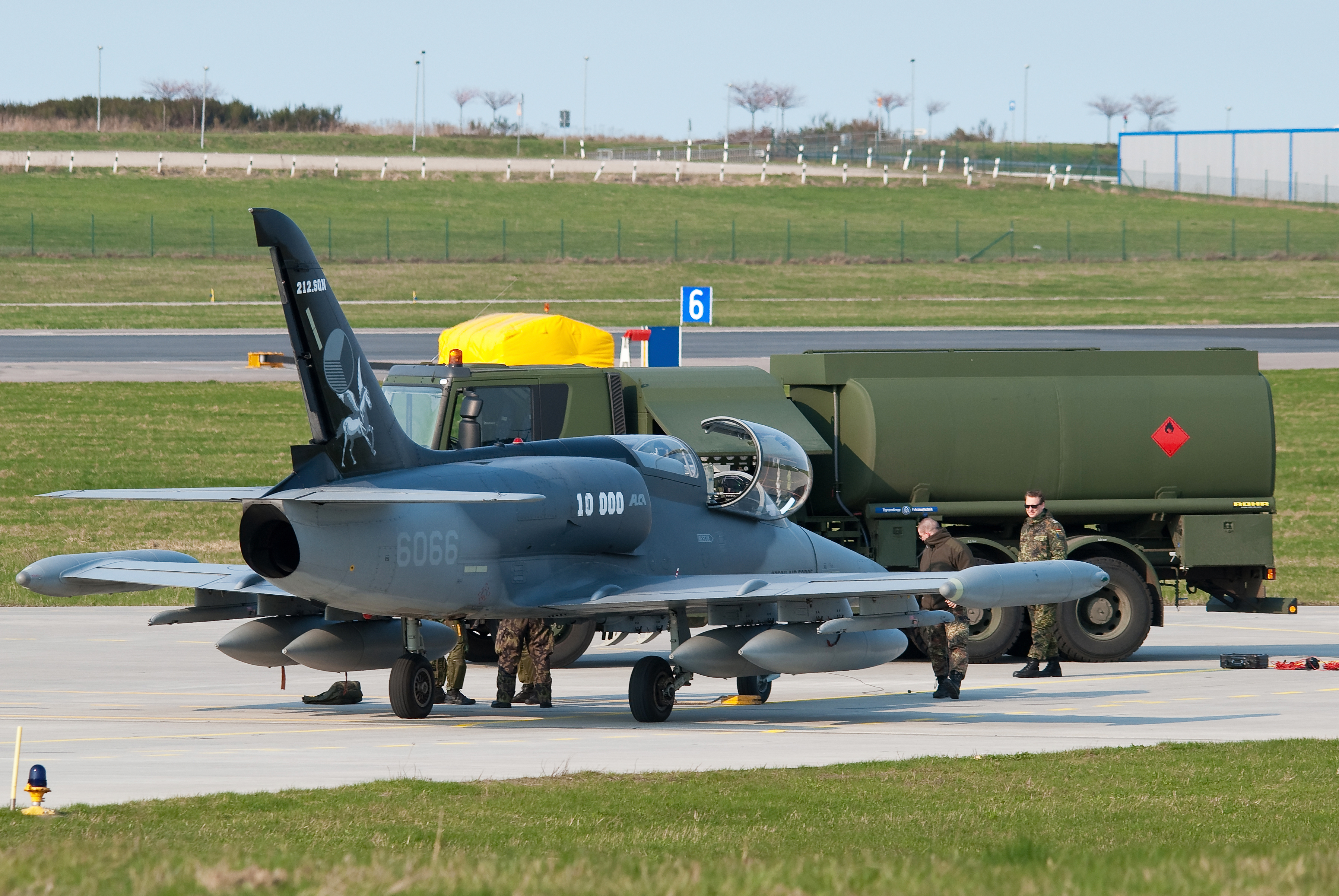 imx00000034